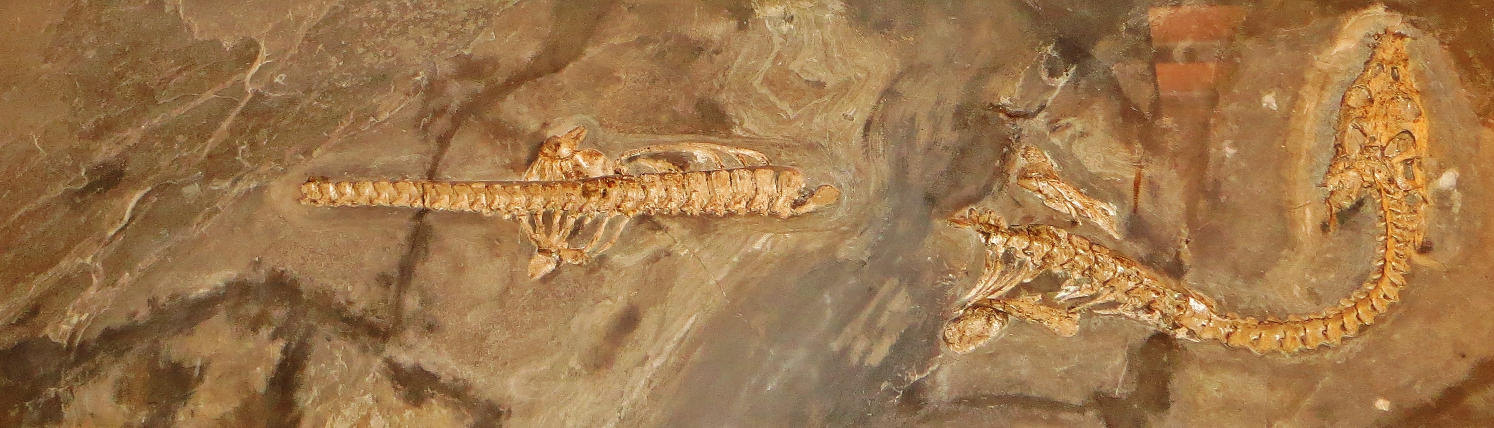 Fossil - Took the picture at Museum of Natural History Zurich